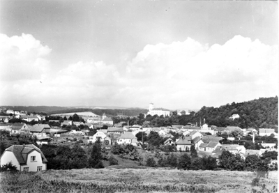 Pohled na Čsernou Horu